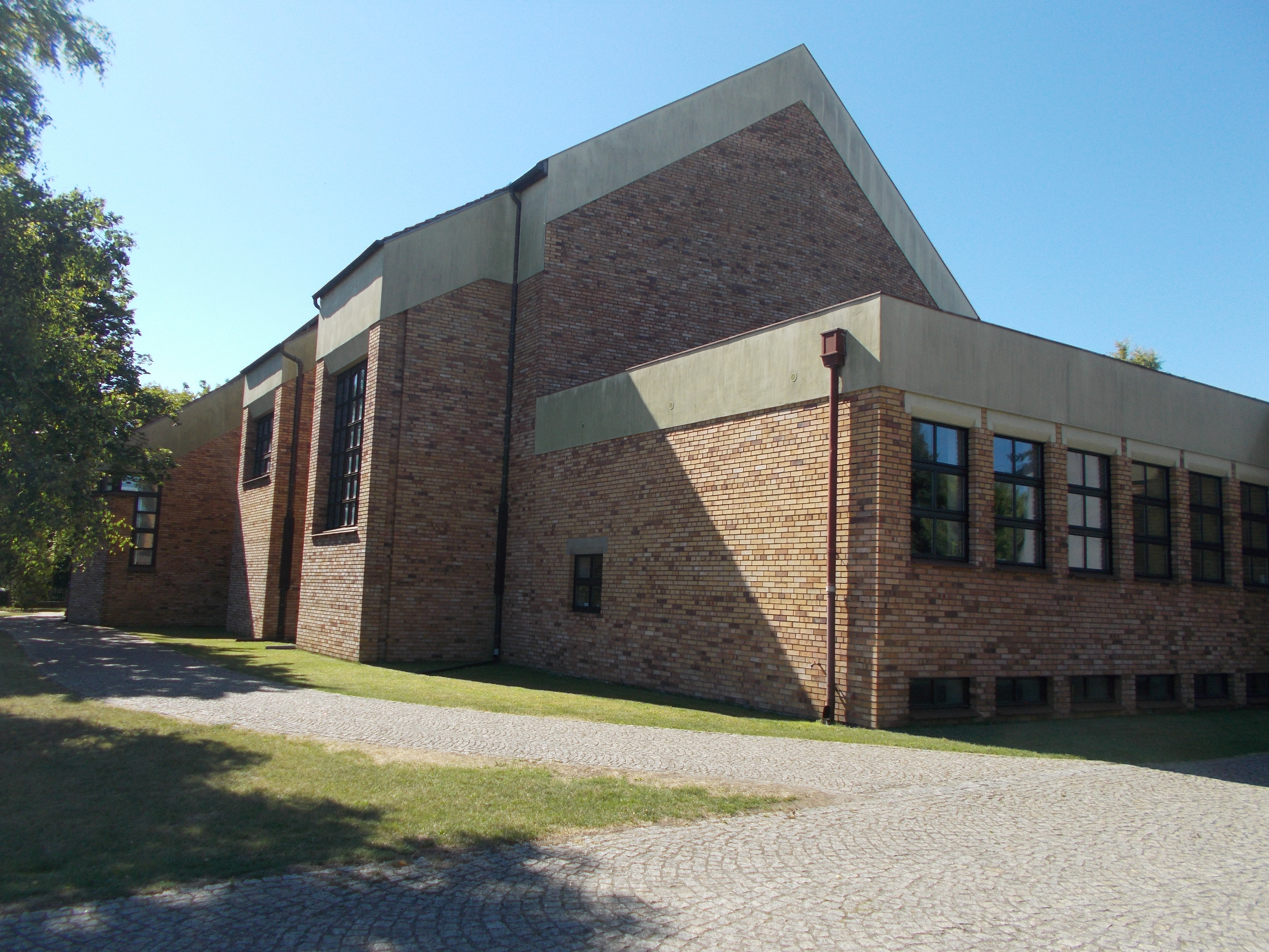 Kościół pw. św. Józefa w Poznaniu widok od strony ulicy Jagodowej.